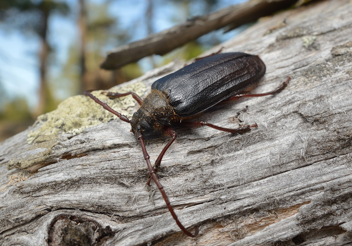 Tragosoma depsarium